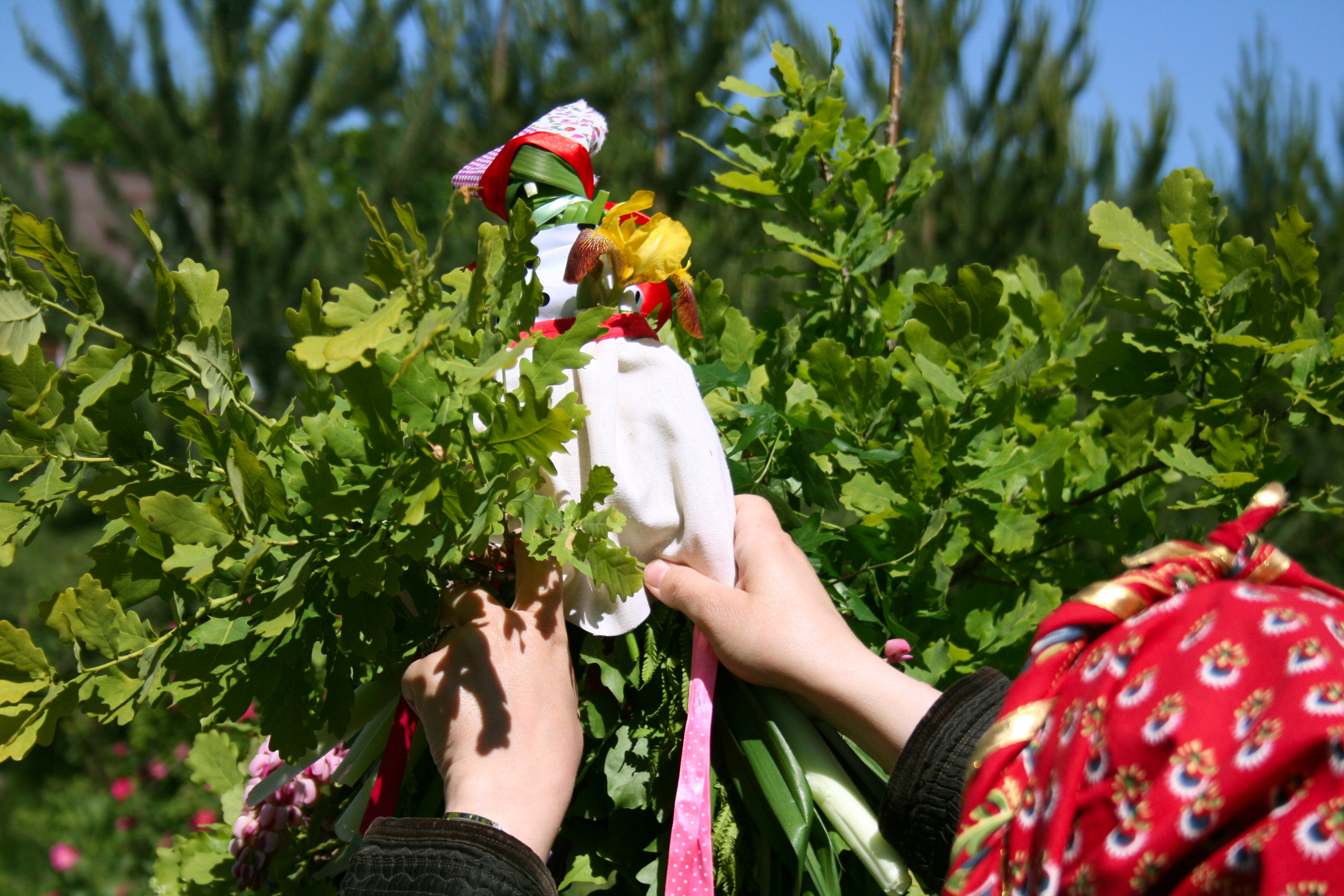 Размещение «кукушки» на троицком дереве. Троица в поселении «Кореньские родники», 2018